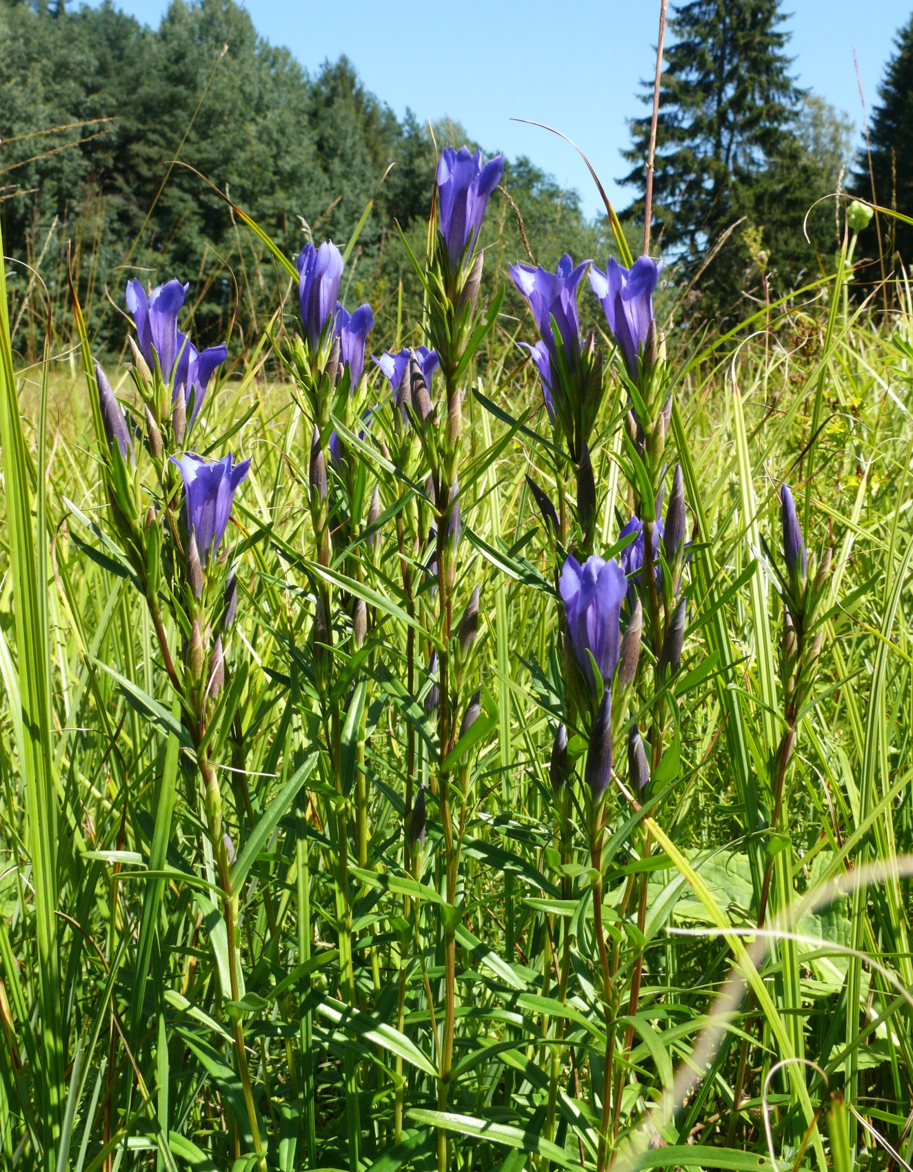 Gentiana pneumonanthe, Schwäbische Alb, Germany